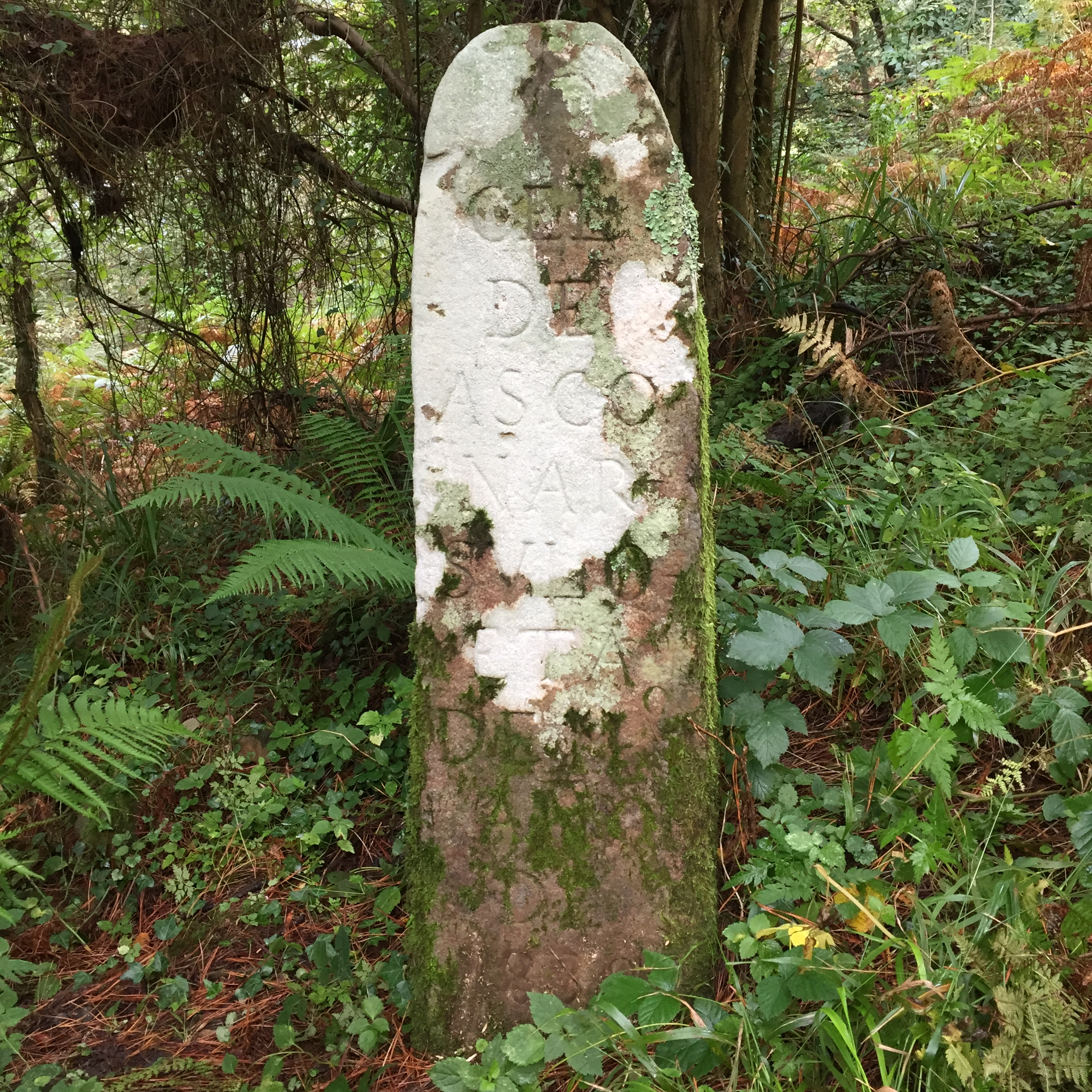 Azkonarzuloeta Kortabasoko mugarria Arrietan, 'Cel de Asconarsuloeta de Mª año de 1838'